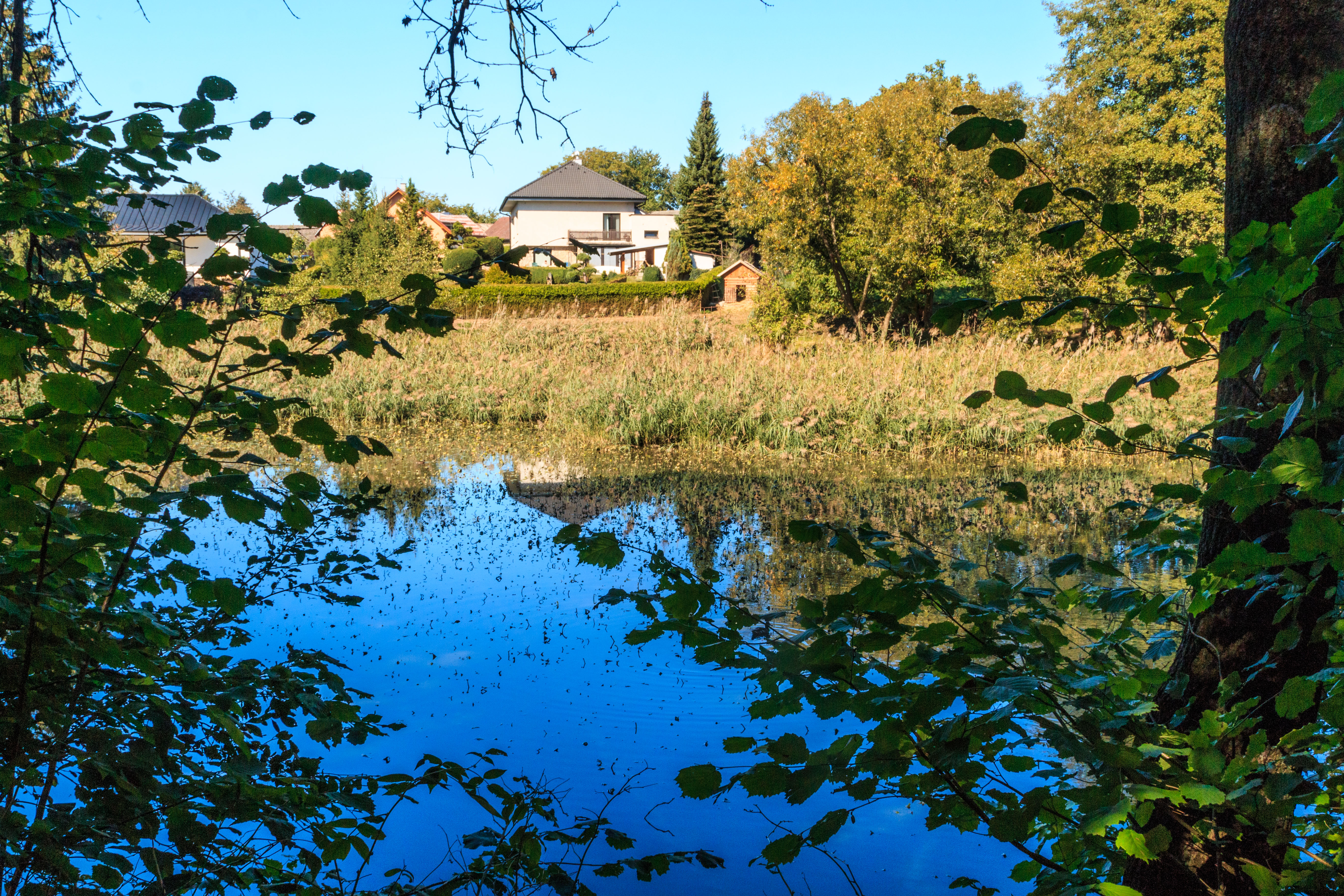 Kněžmostský rybník Project: Vodstvo.